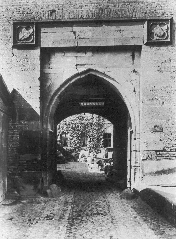 Das Hauptportal der Burg Zülpich am Ende des 19. Jahrhunderts